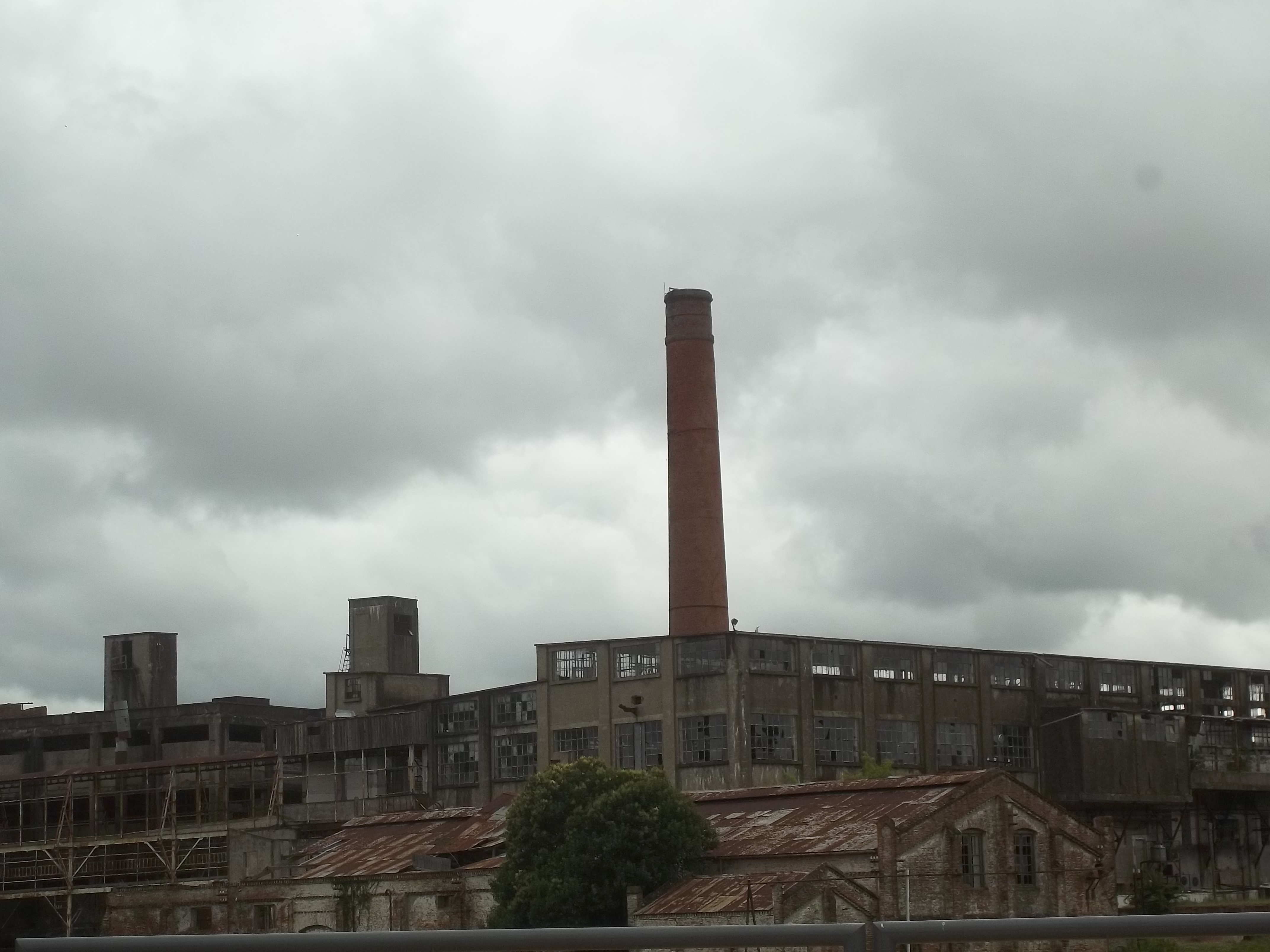 Complejo Industrial Anglo (instalación fabril y puerto) Barrio Anglo, La Pandilla, Zona del Golf, Camino de Tropa, Corrales, Zona de las Romerías Basurero Histórico, Zonas naturales: barrancas y espacios verdes. Ubicada en el departamento de Río Negro